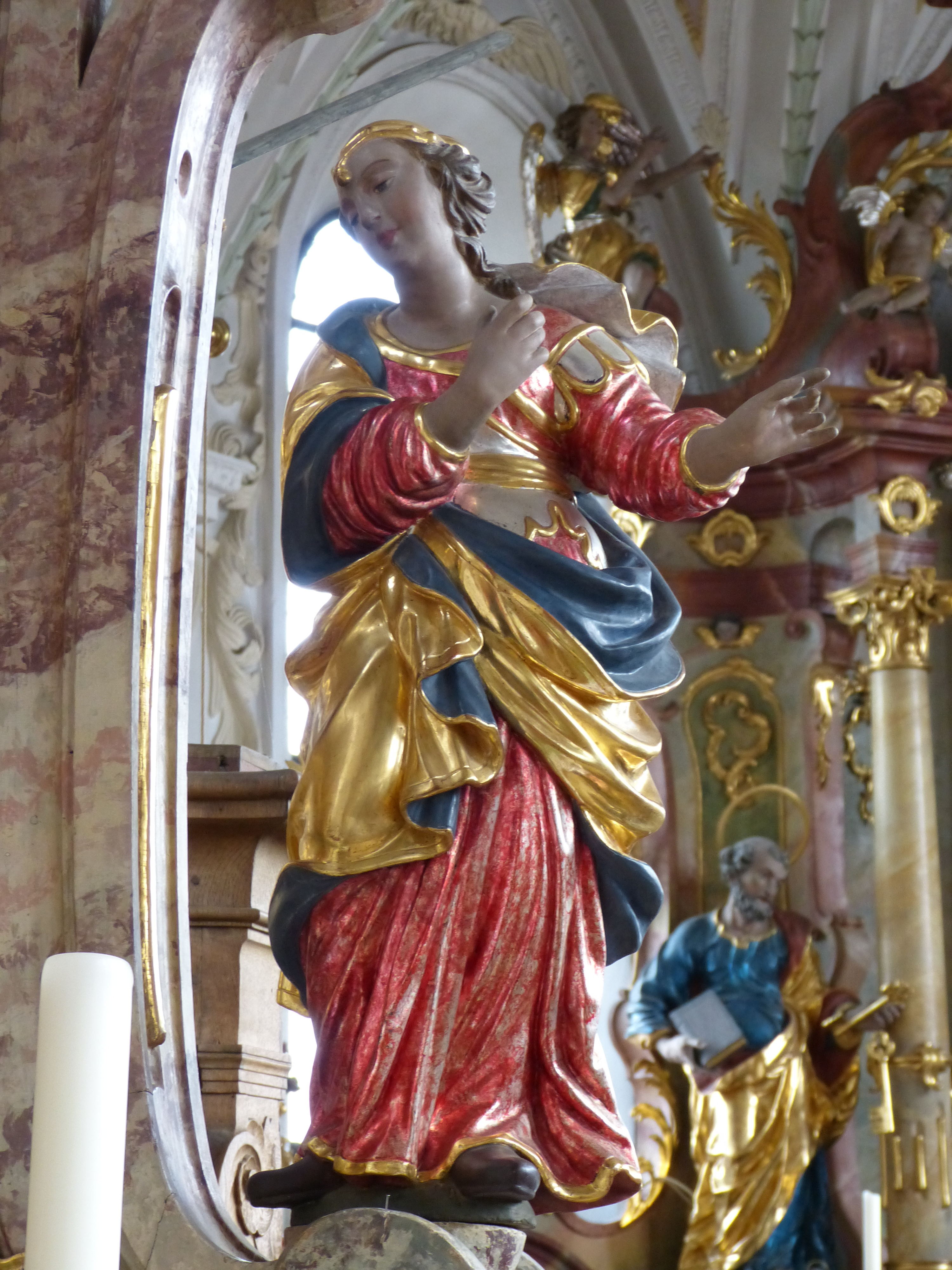 St. Georg, Niederrieden, Landkreis Unterallgäu, Bayern